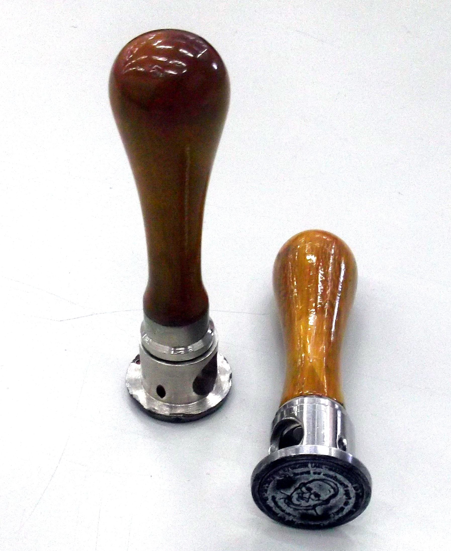 Carimbo obliterador do correio do Brasil usado no selo da Jornada Mundial da Juventude, realizada no Brasil em 2013.